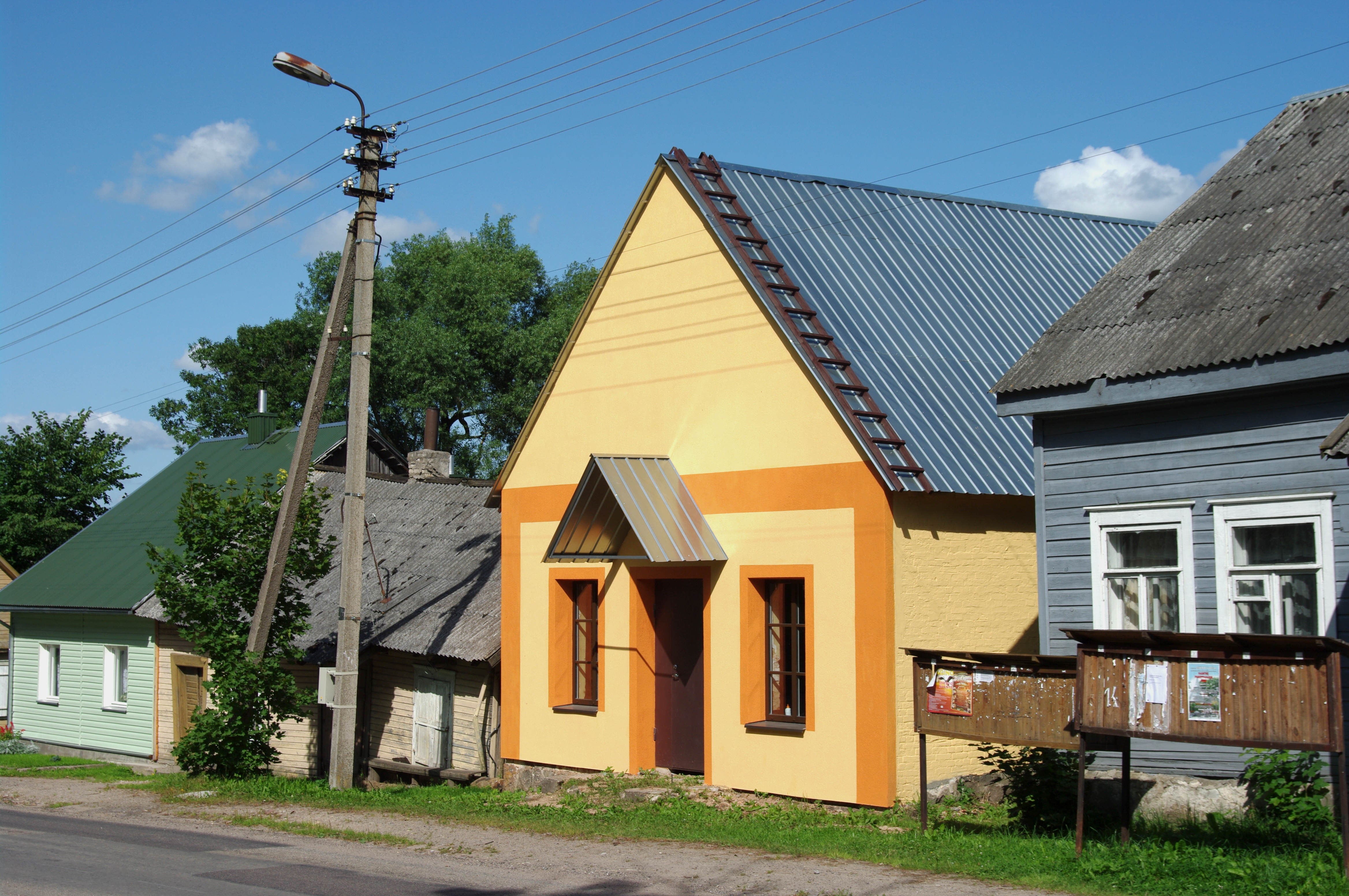 Ryškūs Daugėliškio pastatai - (